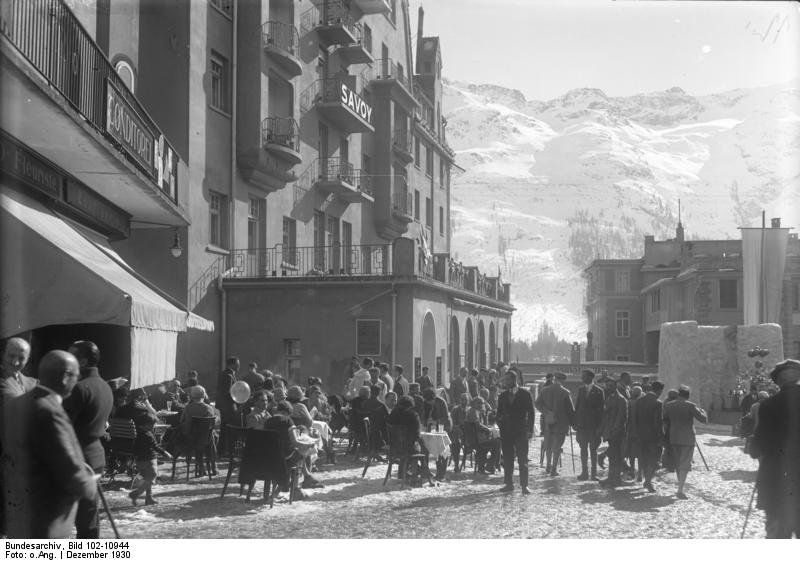 Die Perle der Schweiz, St. Moritz beim Wintersport! Kaffeetrinken in der warmen Wintersonne in den Strassen St. Moritz.